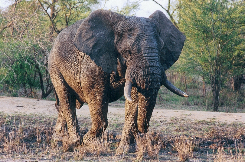 Éléphant photographié dans une réserve privée jouxtant le Parc National Kruger (Limpopo)